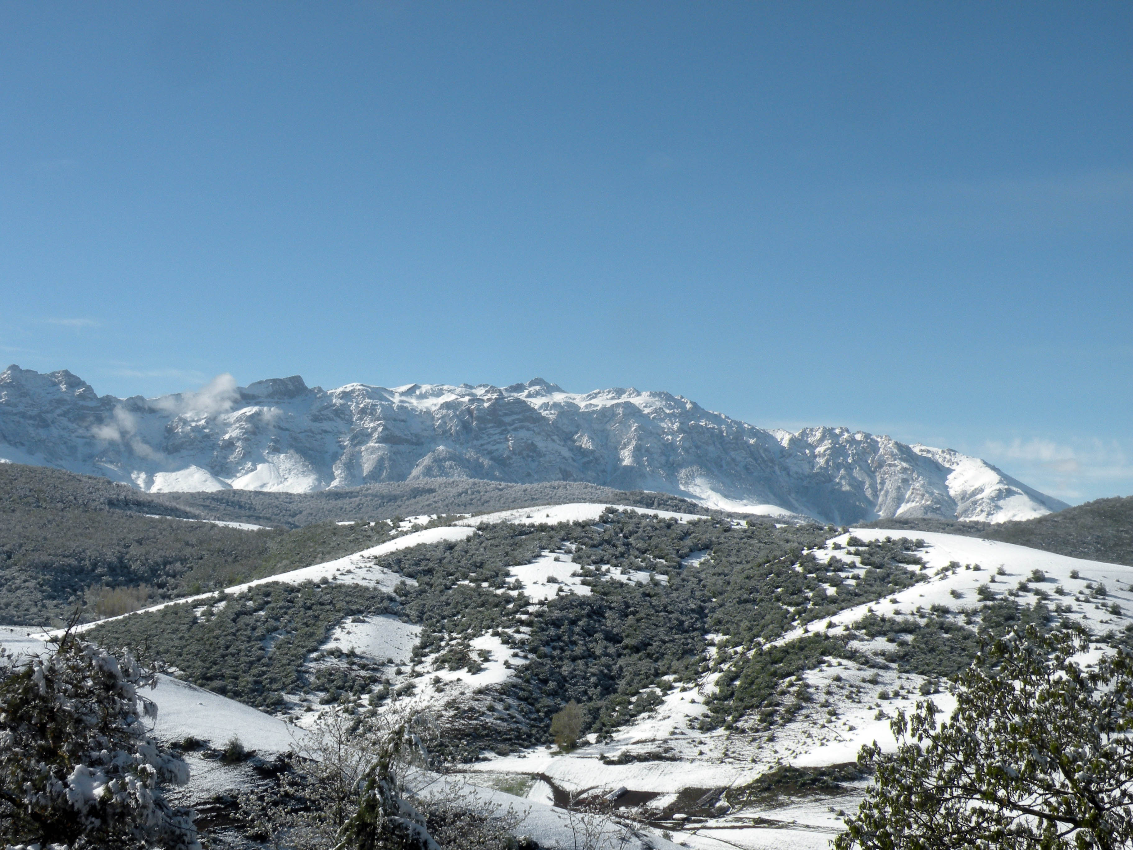 سودکلا در برف